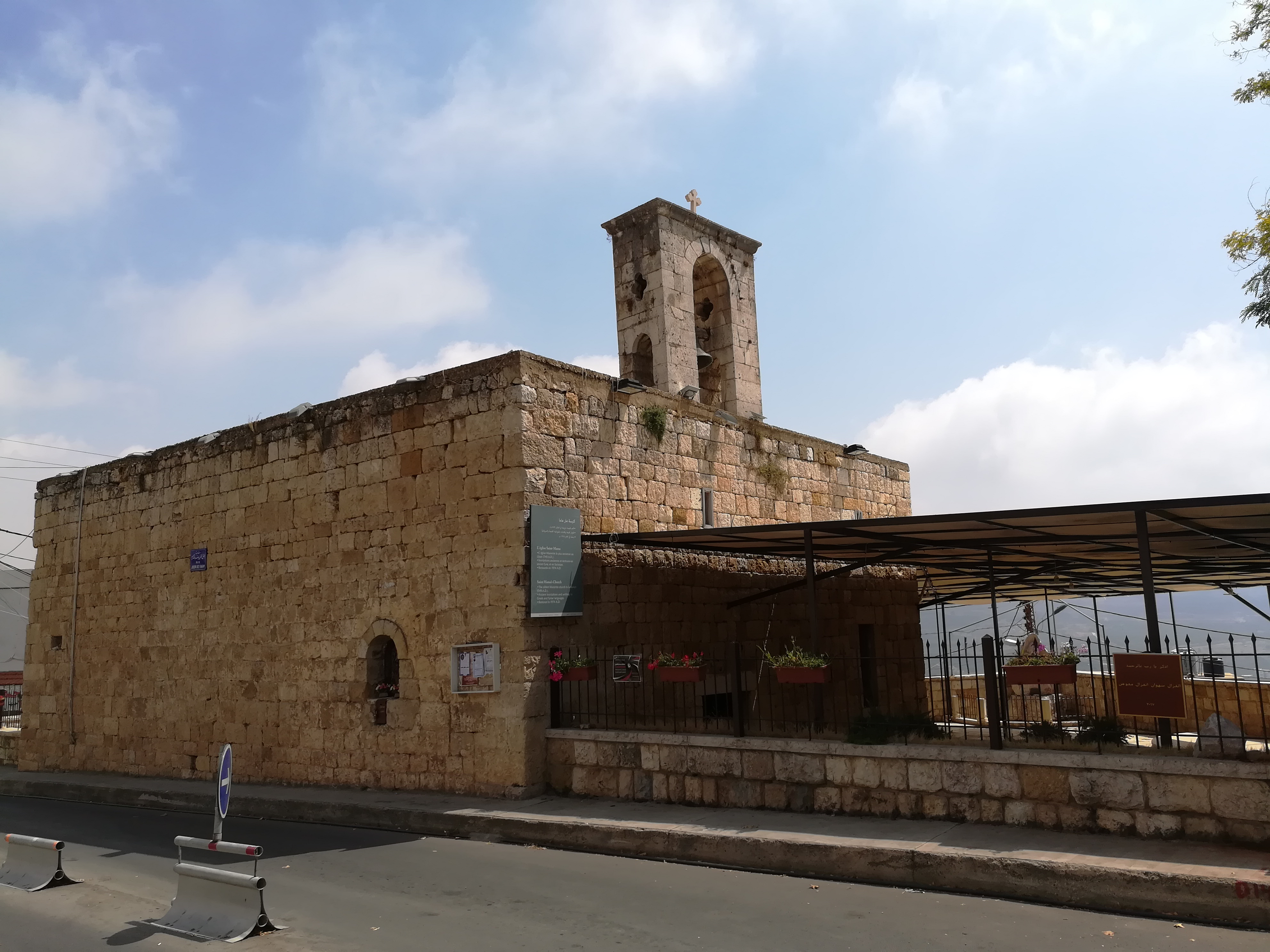 كنيسة مارماما في اهدن، تعد أقدم كنيسة مارونية في لبنان، شيدت سنة 749 للميلاد.